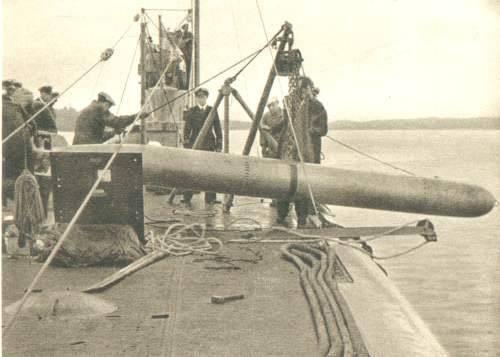 Finnish Navy conducting torpedo trials in the 1930's. Torpedokokeita Suomen laivastossa 30-luvulla.